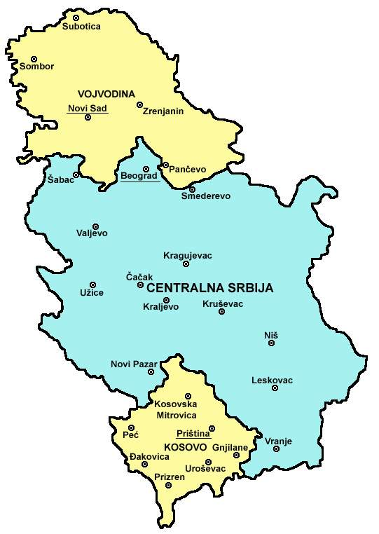 мапа Србије / mapa Srbije